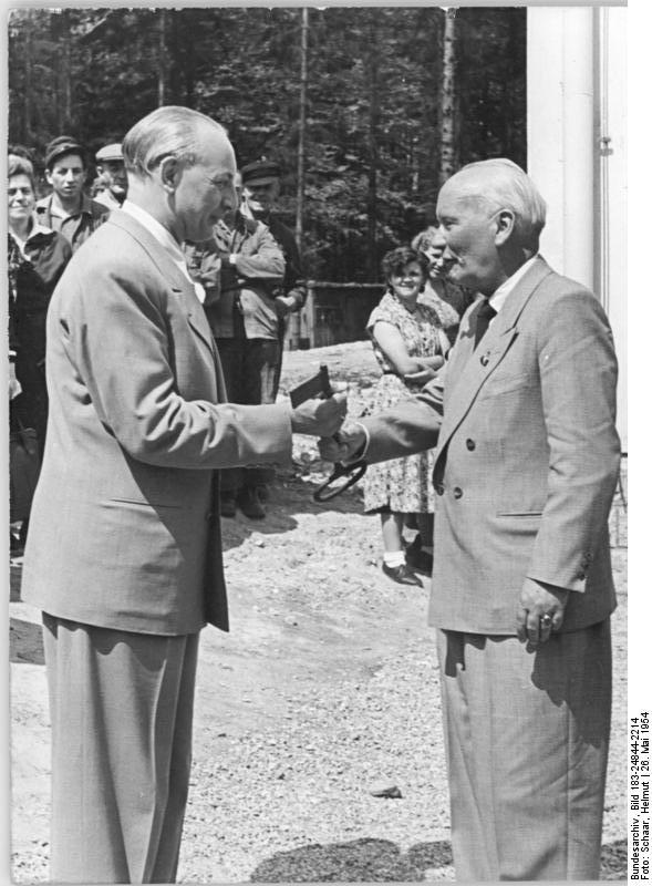 Bad Berka, Tbc-Krankenhaus, Übergabe Zentralbild TBD (Schaar) 31.5.1954 Tbc-Heilstätte Bad Berka ihrer Bestimmung übergeben. In Bad Berka-Thür. wurde am 26. Mai 1954 die grösste und modernste Tbc-Heilstätte Deutschlands (einige Gebäude befinden sich noch im Bau) in Anwesenheit des Ministers für Gesundheitswesen Luitpold Steidle ihrer Bestimmung übergeben. UBz: Prof. Hopp von der Deutschen Bauakademie, (r) Architekt des Bauwerkes, übergibt den Minister für Gesundheitswesen, Luitpold Steidle, den Schlüssel zum ersten Bauabschnitt.